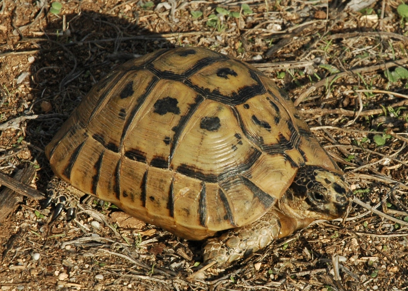 Testudo graeca nabeulensis, Furculachelys nabeulensis varietà 'Sarda'